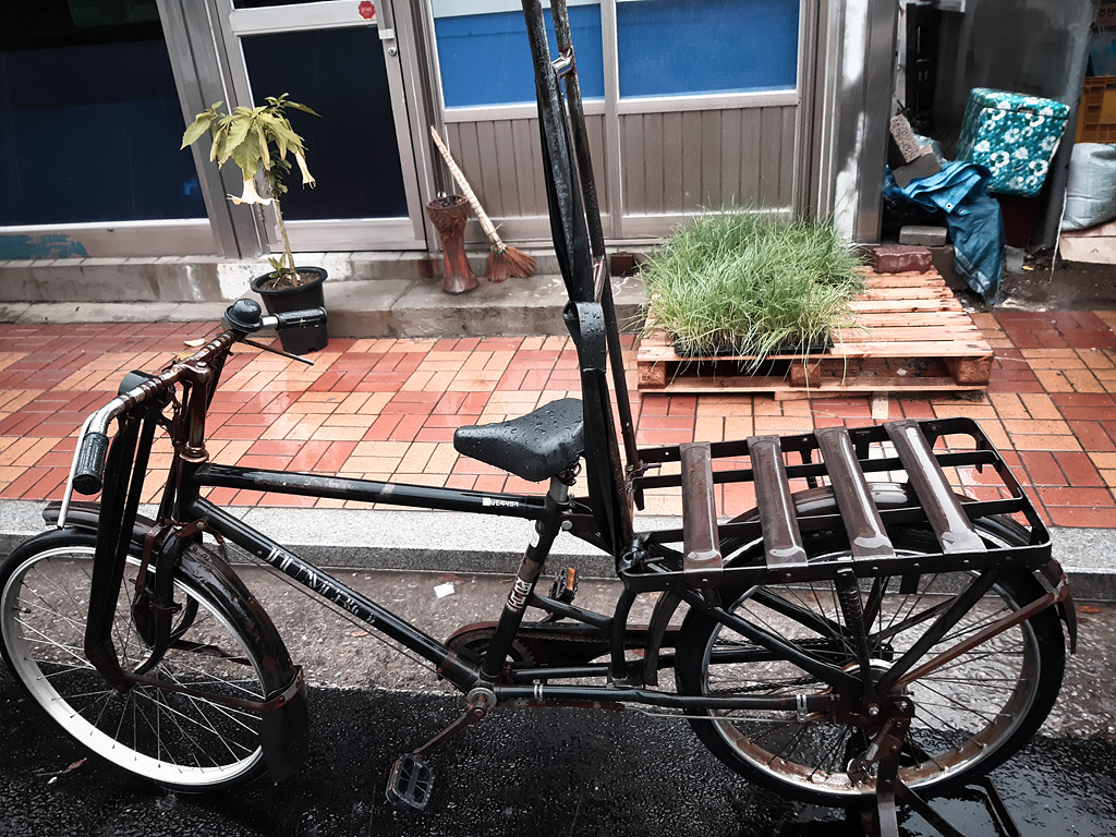 한국의 오래된 자전거이다.